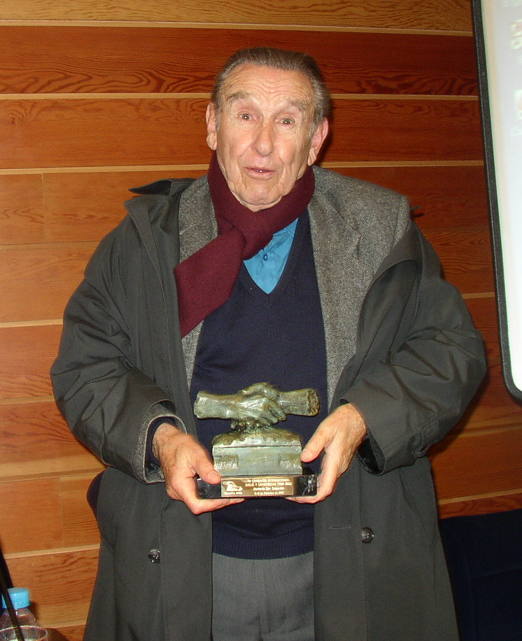 Homenaje a Carlos Blanco, en el transcurso del Congreso "Exilio y Universidad", San Sebastián, diciembre de 2006.